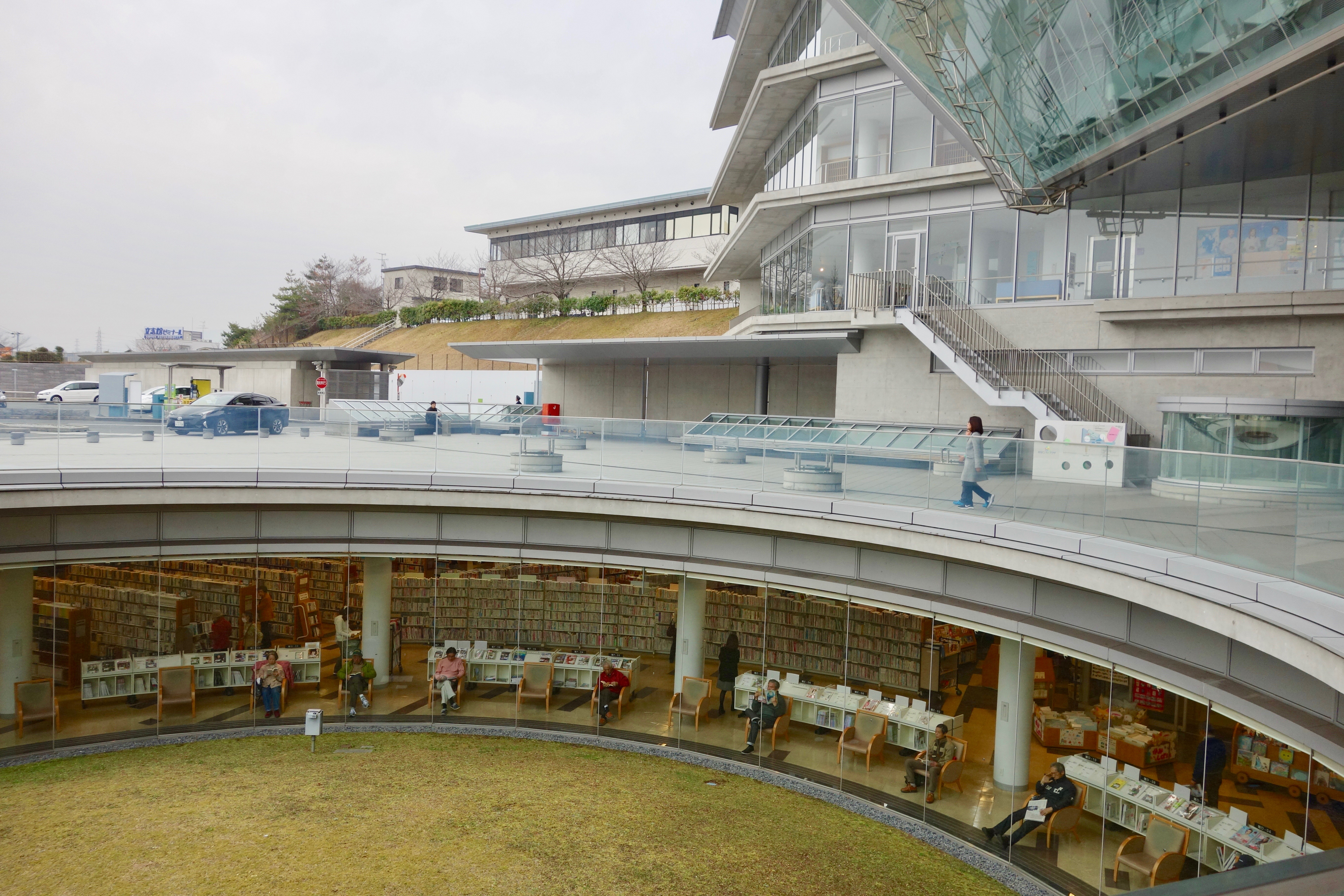 シティプラザ図書館を見下ろす